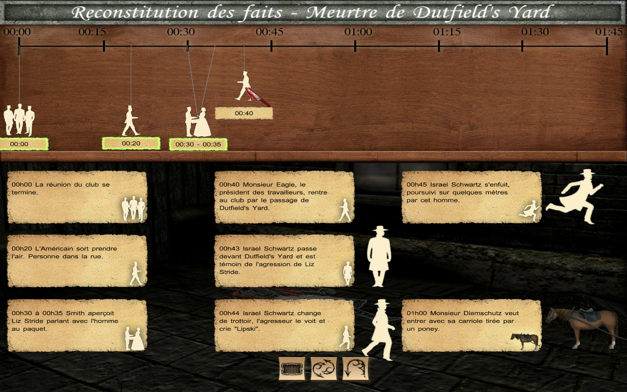 Capture d'écran du jeu Sherlock Holmes contre Jack l'Éventreur. Capture montrant le fonctionnement de "l'échelle de temps" dans le jeu (ici, pour le meurtre d'Elisabeth Stride).